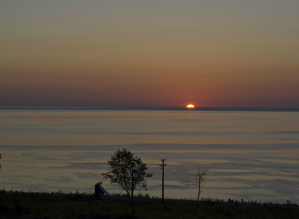 Солнце встаёт из воды